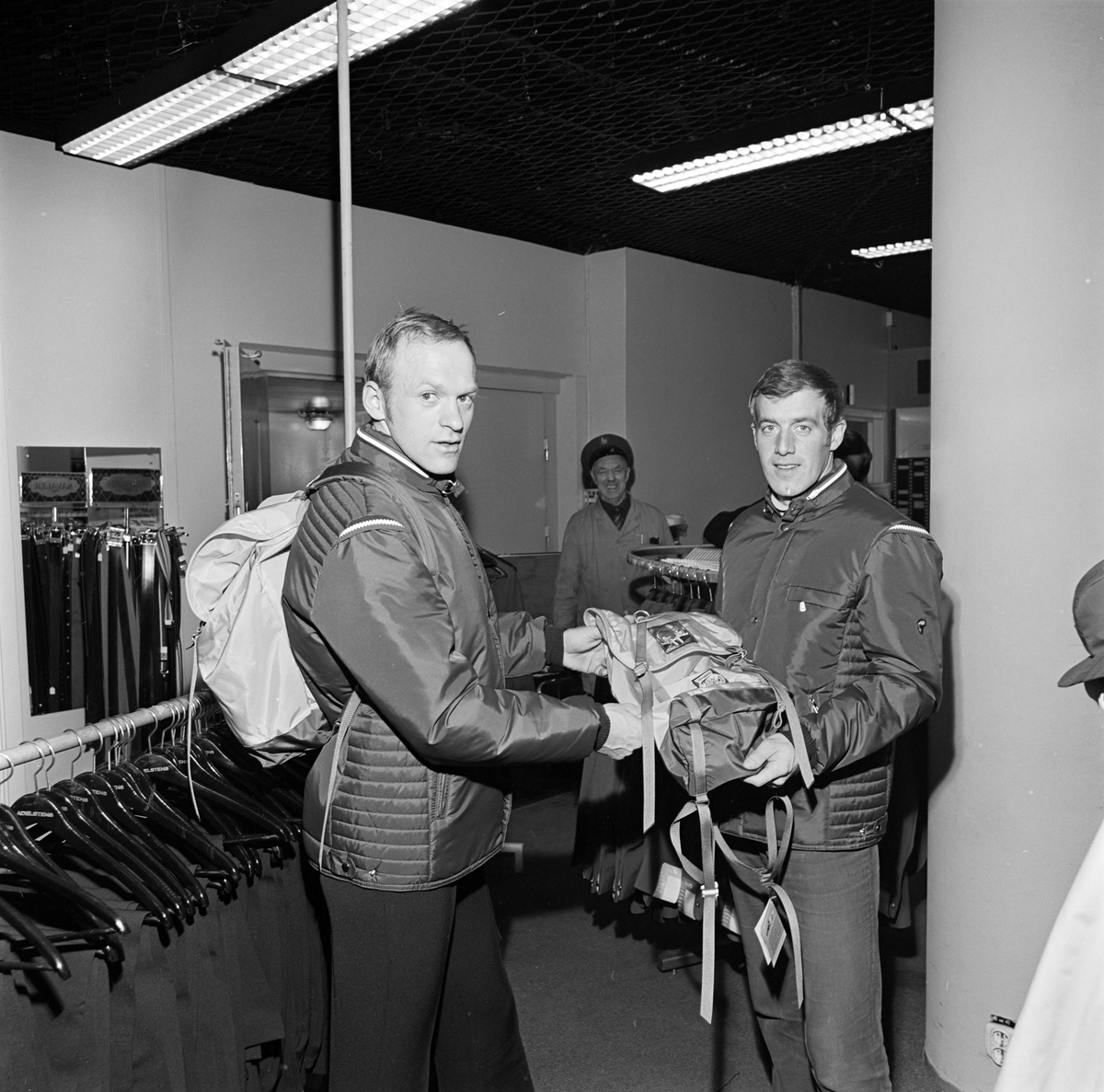 Pål Tyldum til venstre, Magne Myrmo til høyre.